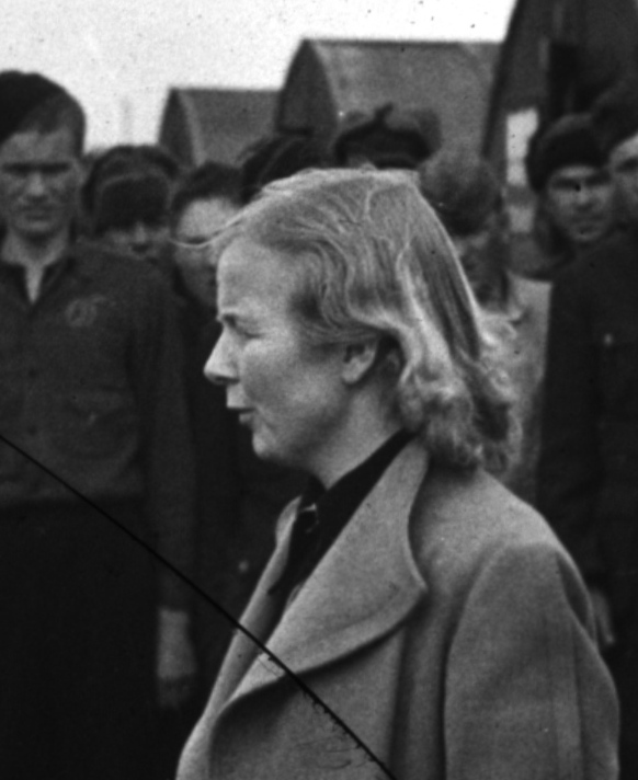 Bildet er hentet fra Arkivverket. Bildetekst: "Første møte med en gruppe frigjorte: Dere er ikke lenger fanger, men frigjorte soldater i Den Røde Armé." Fra venstre: Gunvor Galtung Haavik, Leiv Kreyberg og ukjent mann med Røde Kors-armbind.Gunvor Galtung Haavik arbeidet som tolk for Leiv Kreyberg. Arkivinstitusjon : Riksarkivet Arkivnavn : Kreyberg, Leiv Sted : NORGE, 00 Ukjent, 00 Ukjent, Emneord: Andre verdenskrig, Krig Avbildet